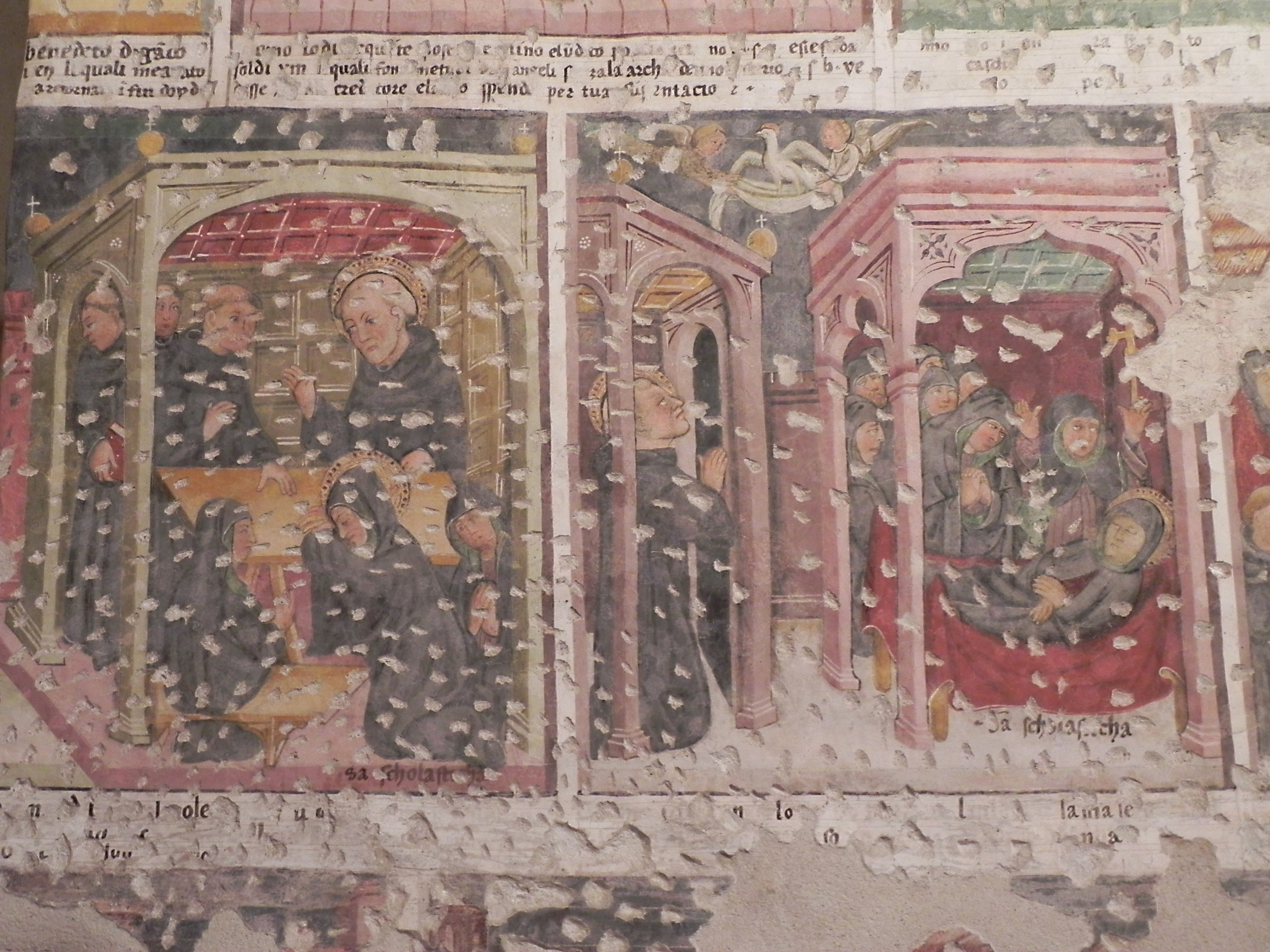 Gromo (BG) - Chiesa di San Giacomo Affreschi all'interno della cappella di San Benedetto